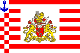 Dienstflagge für Staatsfahrzeuge und Staatsgebäude der Marine, Bremen 1952